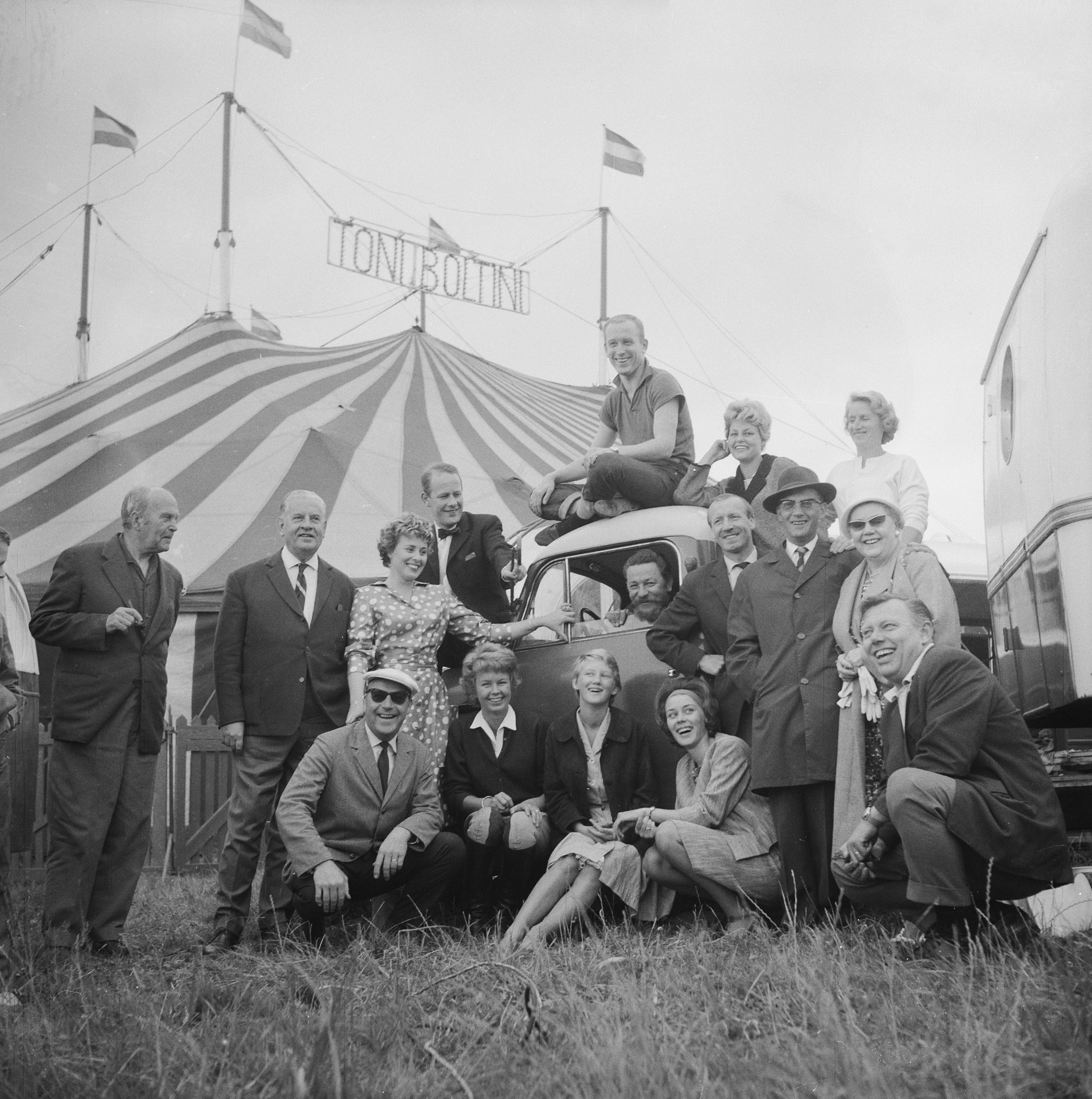 Collectie / Archief : Fotocollectie Anefo Reportage / Serie : [ onbekend ] Beschrijving : Voorstellen van artiesten van Grand Gala des Artistes Datum : 17 juli 1962 Trefwoorden : ARTIESTEN Persoonsnaam : Grand Gala des Artistes Fotograaf : Nijs, Jac. de / Anefo Auteursrechthebbende : Nationaal Archief Materiaalsoort : Negatief (zwart/wit) Nummer archiefinventaris : bekijk toegang 2.24.01.03 Bestanddeelnummer : 914-1366 Reacties Geplaatst door Maaike op 28 mei 2014 - 13:04. Instellingsnamen: Circus Boltini Plaats: Amsterdam, Noord-Holland NB. De opbrengst van deze avond - gehouden op 18 juli 1962 - was bestemd voor de stichting 'Blijvend Applaus'; een fonds voor noodlijdende artiesten